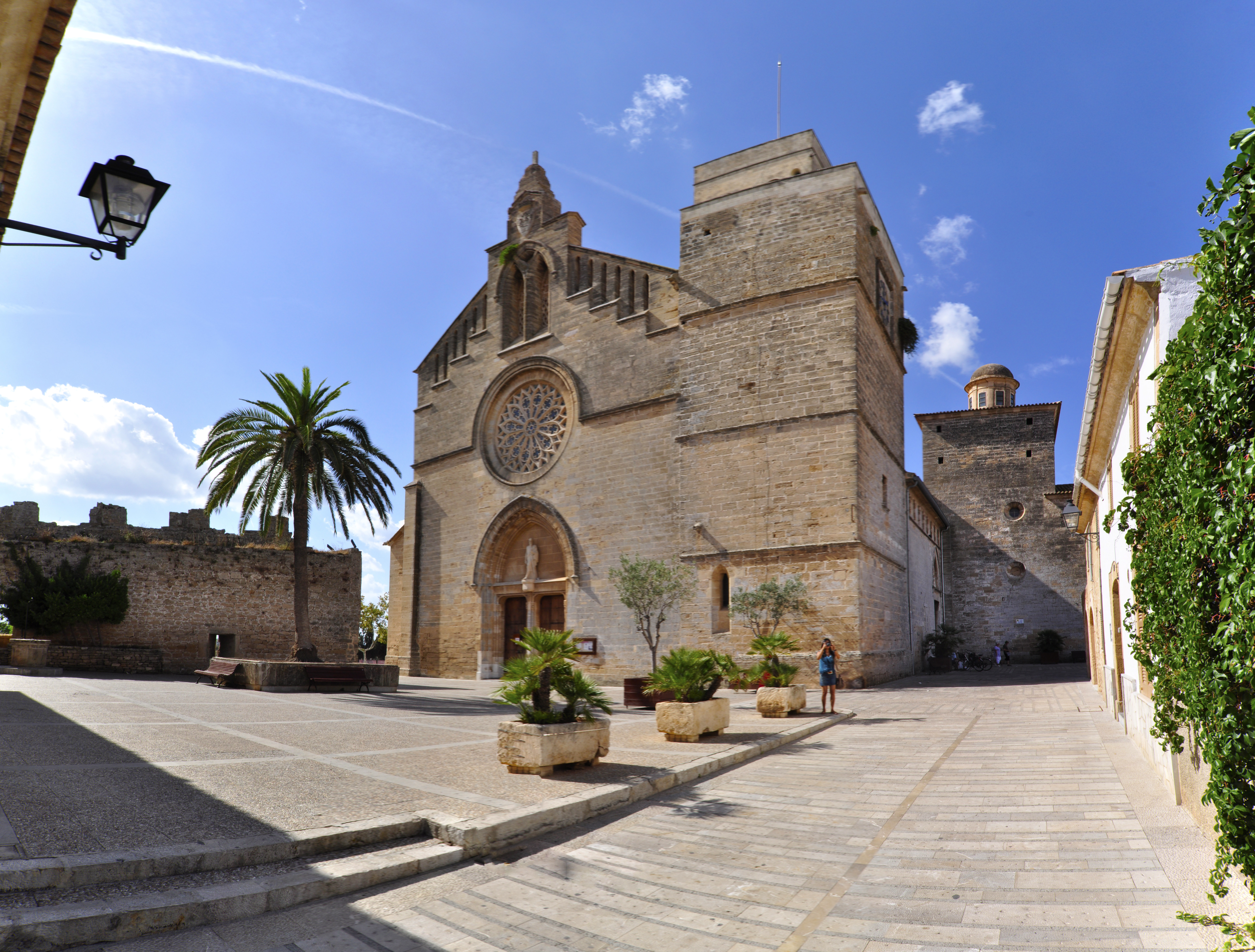 Iglesia,St. Jaume